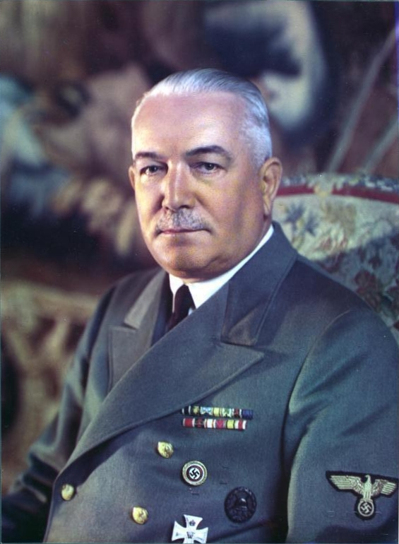 Konstantin von Neurath Porträt Konstantin Freiherr von Neurath (in Uniform als Reichsprotektor von Böhmen und Mähren) , offensichtlich ein Werbefoto für den Nazifunktionär Abgebildete Personen: Neurath, Konstantin von Freiherr: Außenminister, Reichsprotektor für Böhmen und Mähren, Deutschland (GND 118786016)